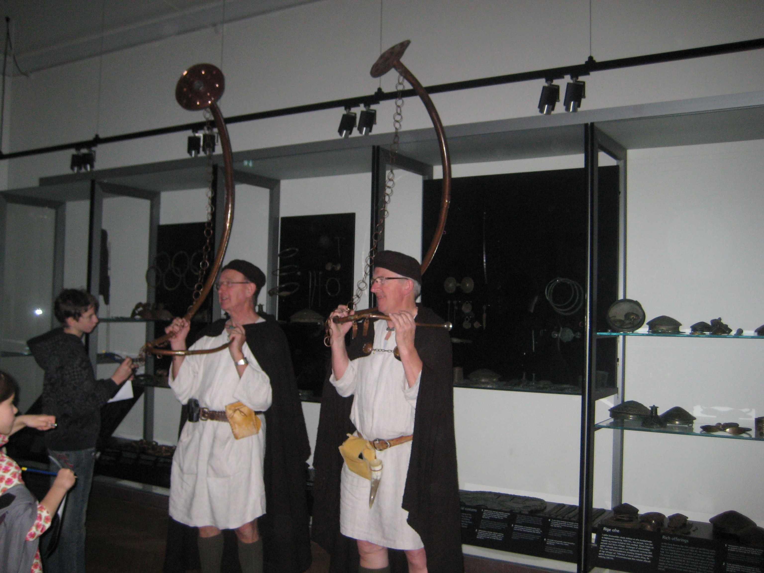 Lurspil i bronzealderen